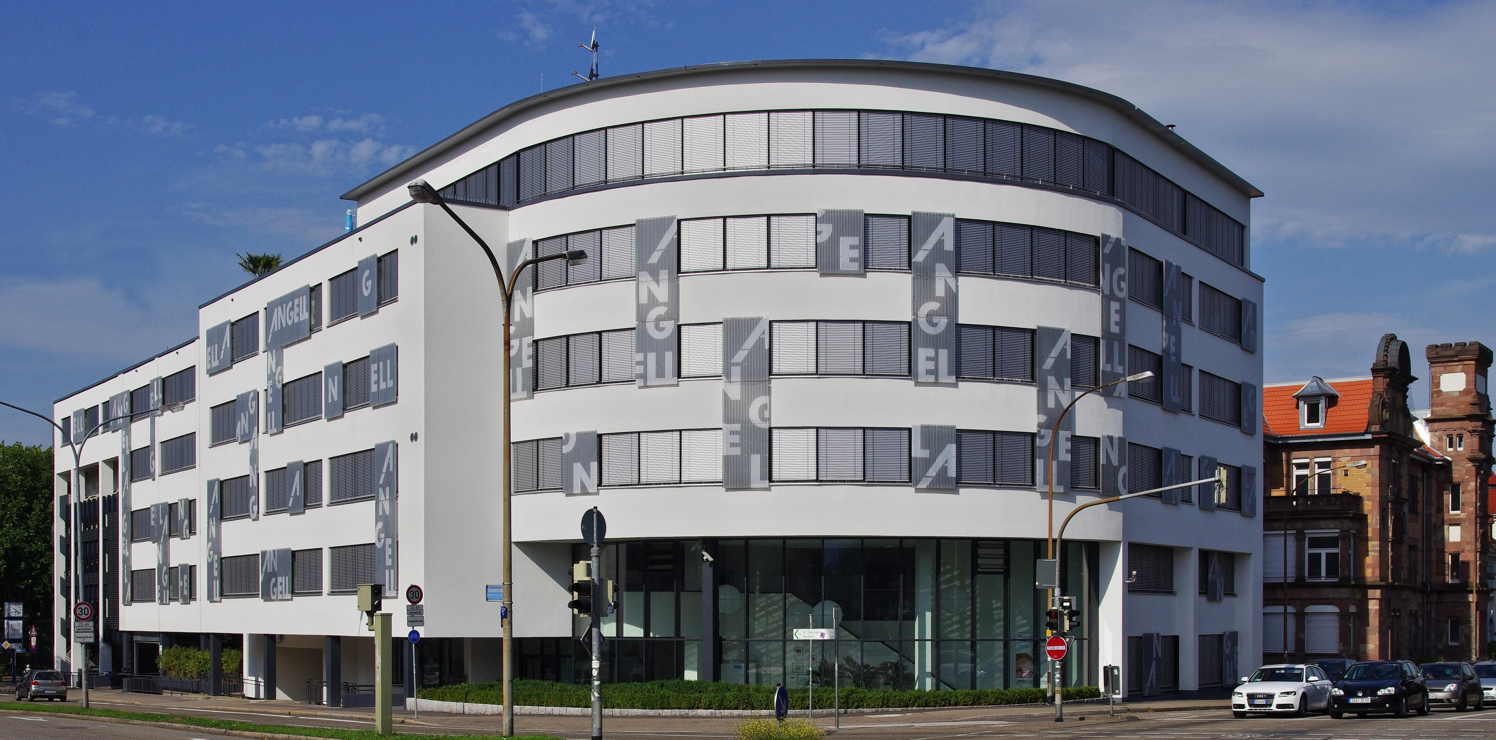 Das Gebäude der Angell Akademie Freiburg GmbH